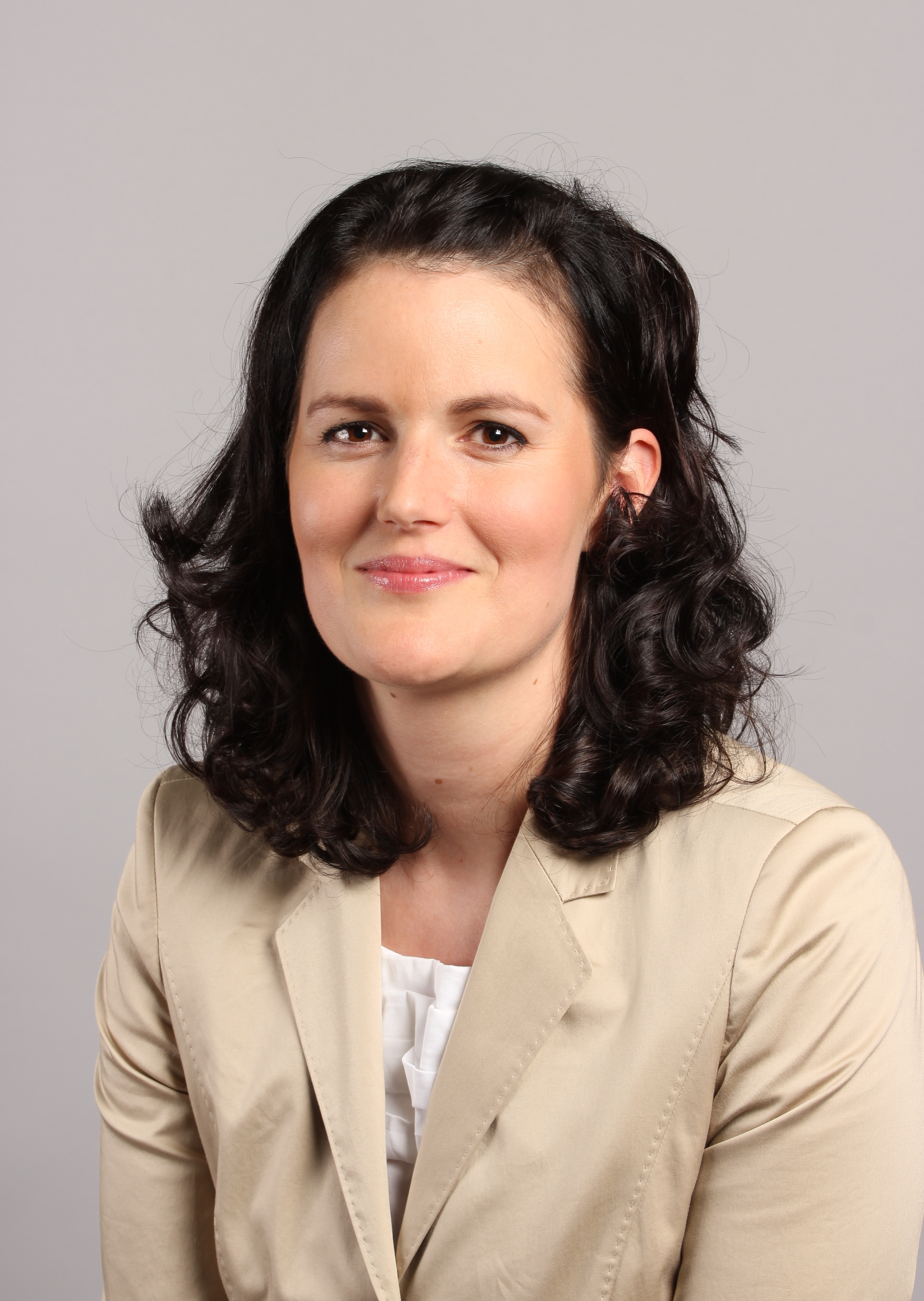 Anneke Graner. Wikipedia im Landtag – Baden-Württemberg 15.–16. Mai 2013 in Stuttgart Fragen zur Nachnutzung Wenn Sie Fragen zur Nachnutzung dieses Bildes haben, können Sie sich jederzeit gern an wenden Personality rights warningAlthough this work is freely licensed or in the public domain, the person(s) shown may have rights that legally restrict certain re-uses unless those depicted consent to such uses. In these cases, a model release or other evidence of consent could protect you from infringement claims.